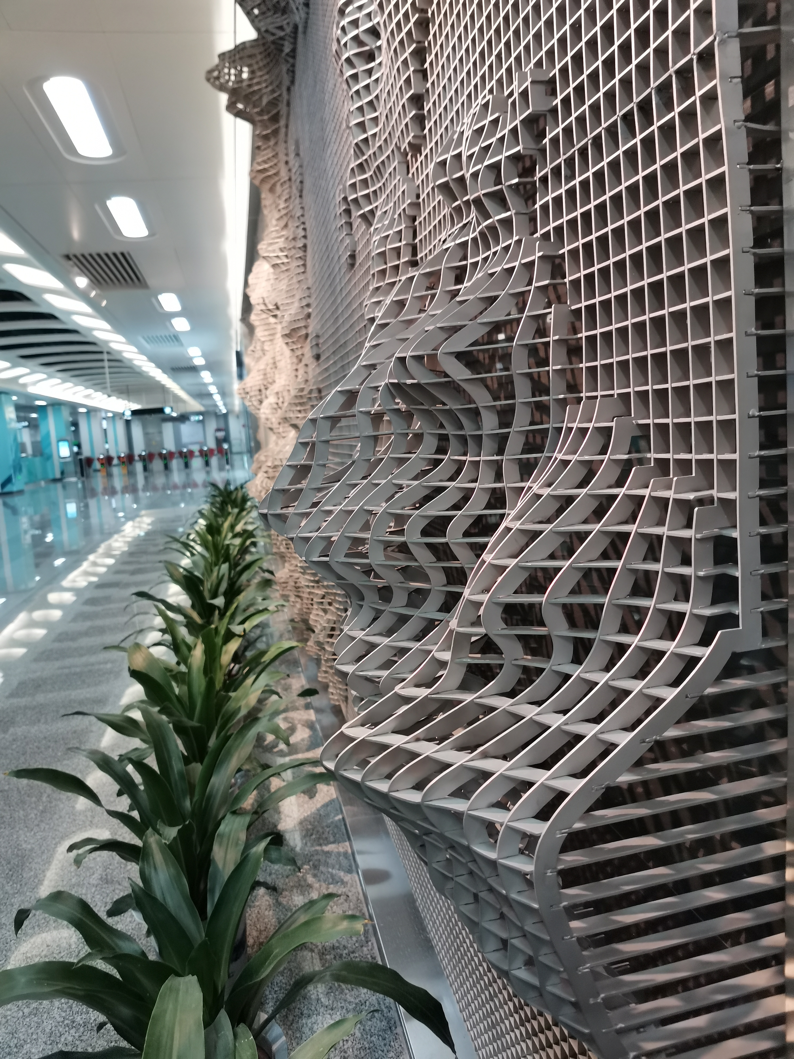 前湾站艺术墙之一，位于9号线站厅区，以铁网和水泥为主要材料